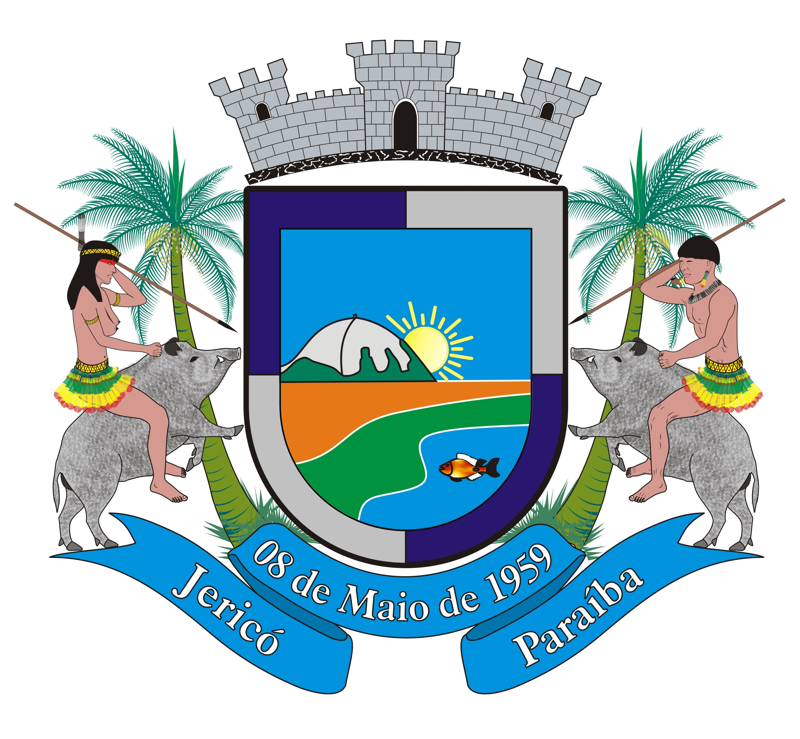 Brasão do município de Jericó, Paraíba, Brasil